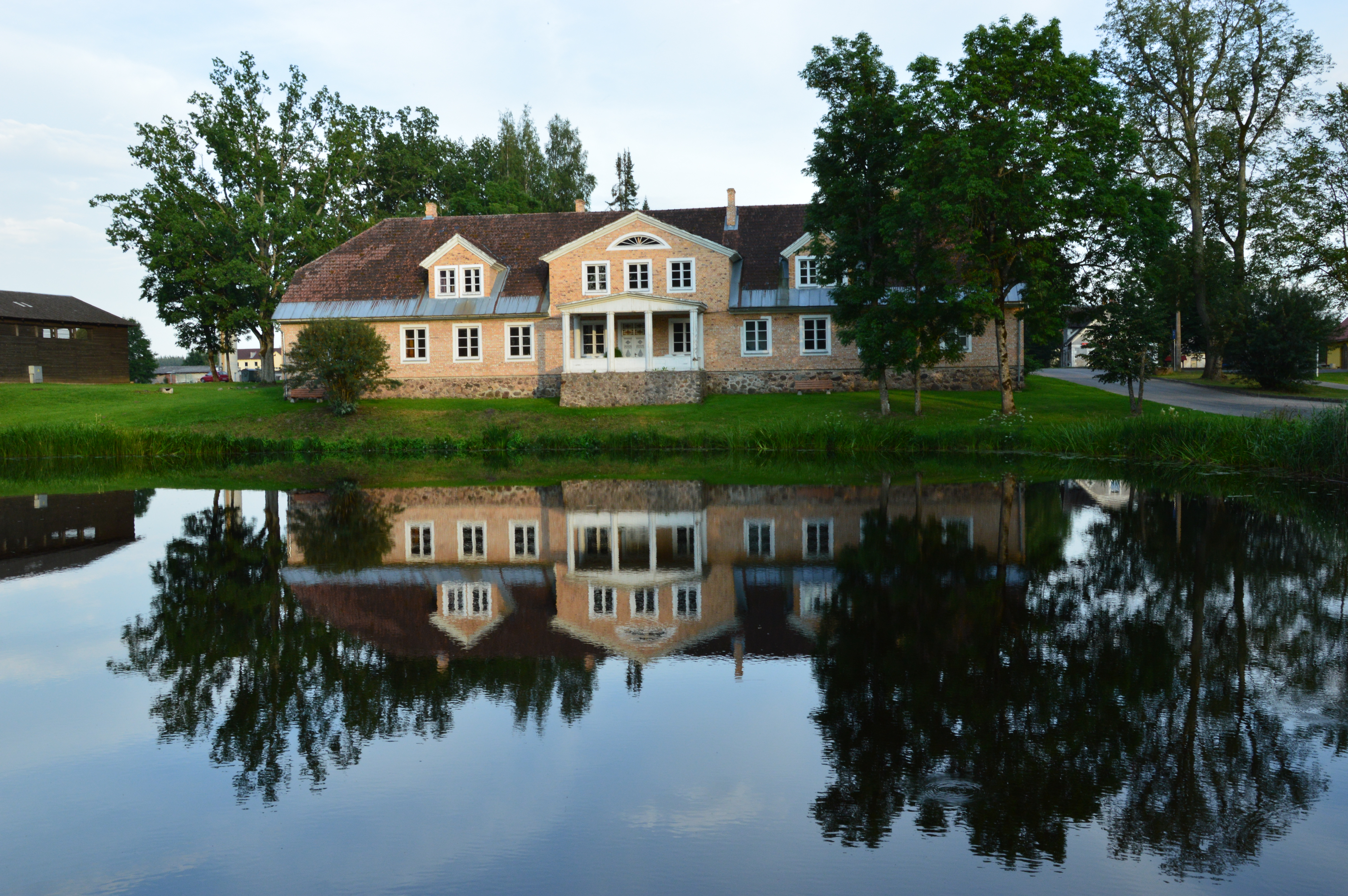 Mūrmuiža